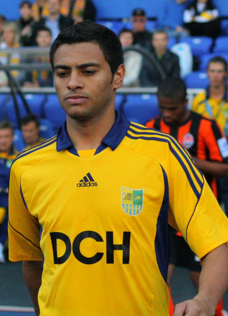 25/09/2010, Металлист - Шахтер - 1:2 Шавьер, Фининьо